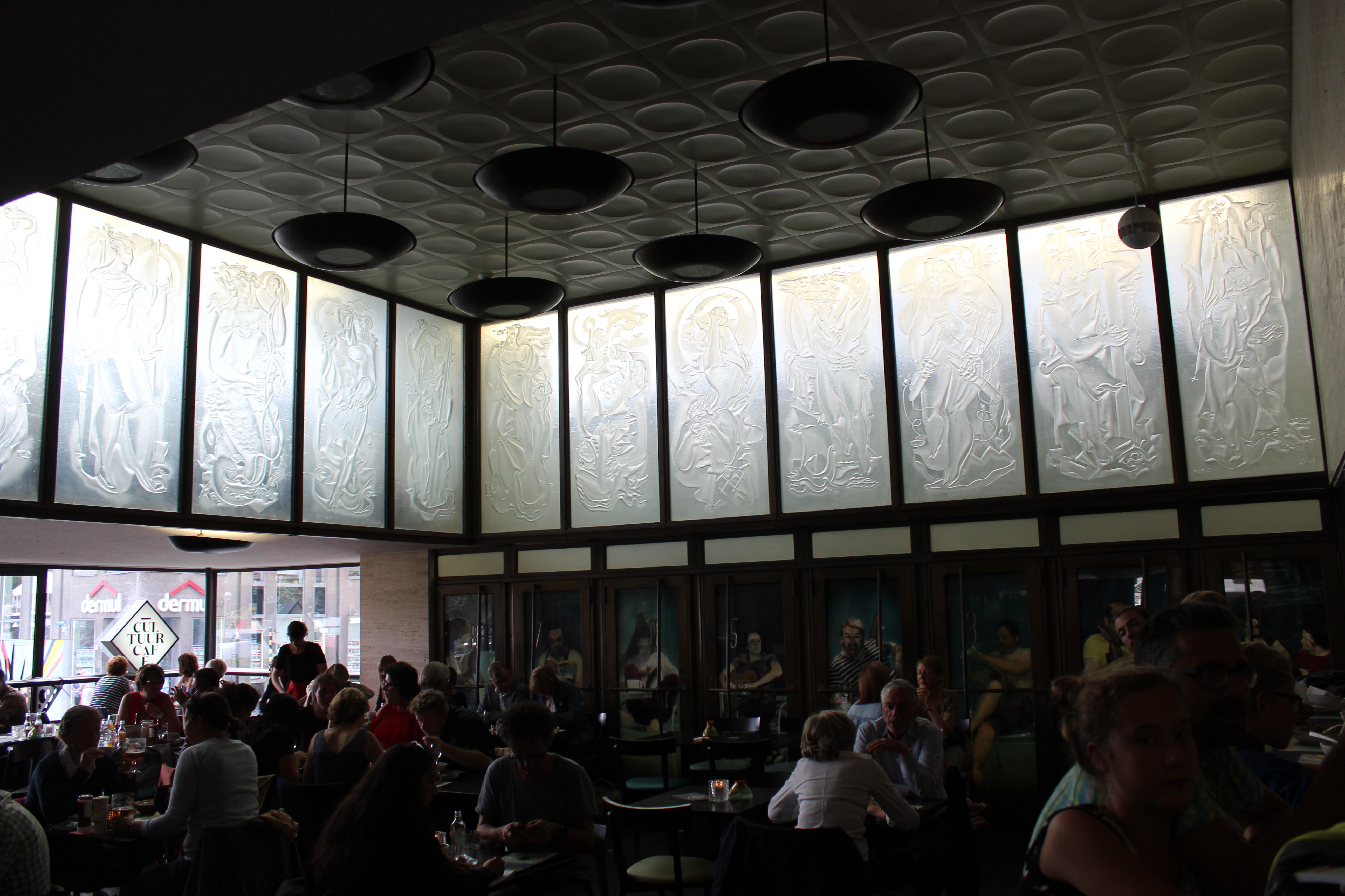 Central hal of the former post office in Oostende - now used as a cafe. At the upper parts of the wall various GLASS reliefs by the artist Jo MAES.